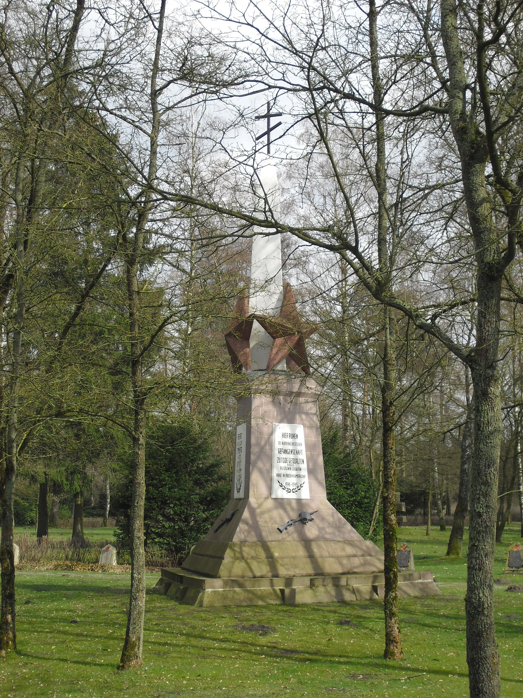 Denkmal auf dem sowjetischen Ehrenfriedhof in Stukenbrock